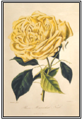 Gravure représentant la rose Maréchal Niel